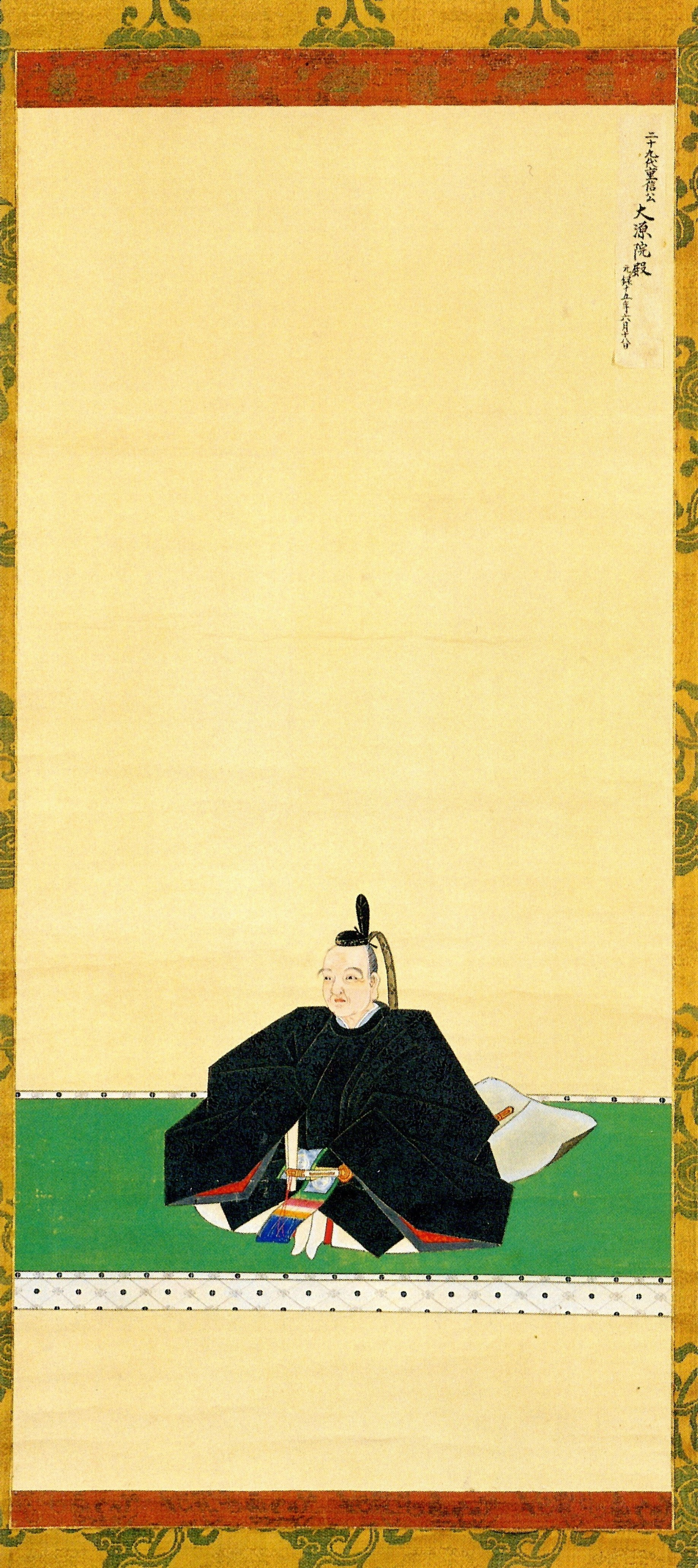 南部重信の肖像。